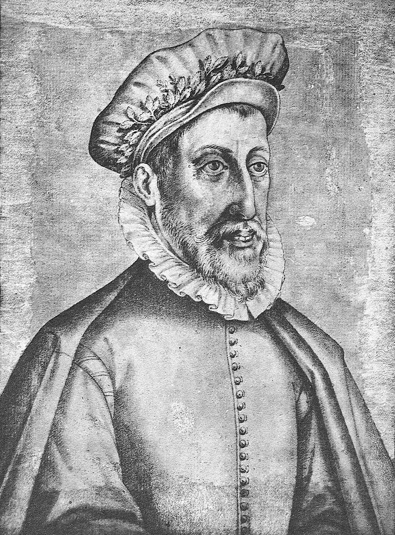 Detalle del retrato de Juan de Mal Lara en Francisco Pacheco, (1564-1644) El libro de descripción de verdaderos retratos, ilustres y memorables varones, [Sevilla, s.n., s.a.]- Real Academia de la Historia (Madrid). Signatura: 1/736